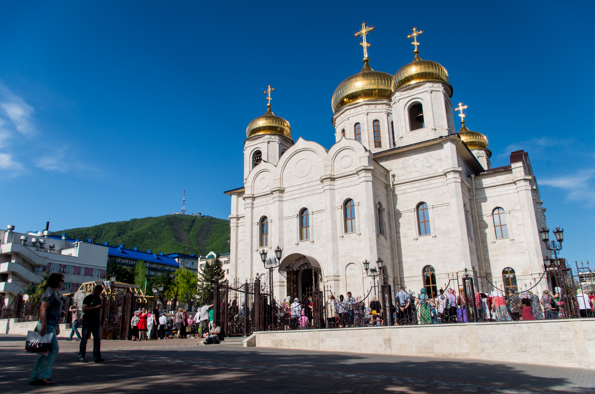 Кафедральный собор во Имя Христа Спасителя, исцеляющего расслабленного при Овчей купели в Пятигорске